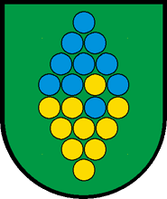 Wappen von Cugnasco-Gerra , Kanton Tessin, Schweiz